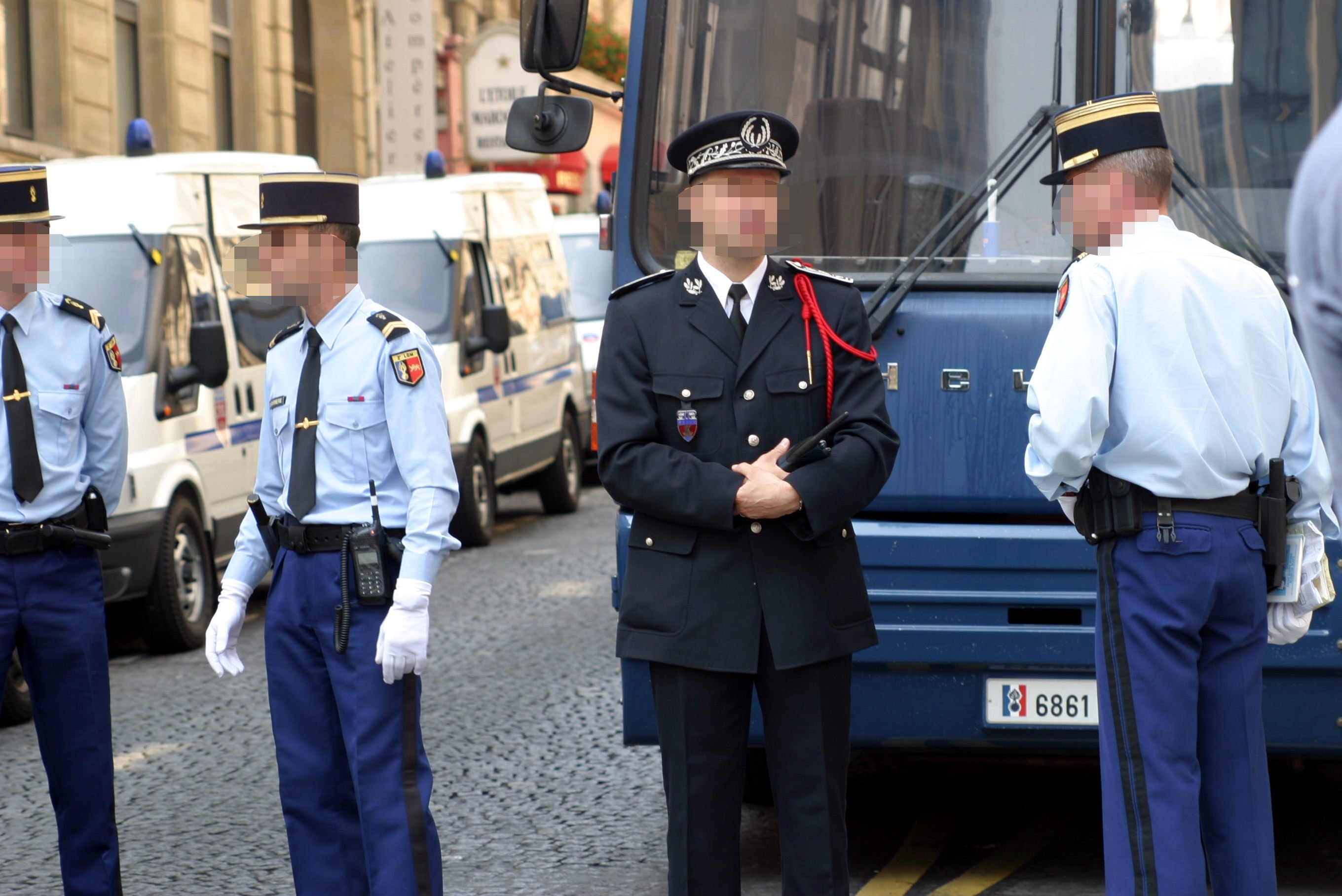 Gendarmerie nationale de France. Trois gendarmes encadrant un officier de police. Military parade, Avenue des Champs-Élysées, 14 July 2006